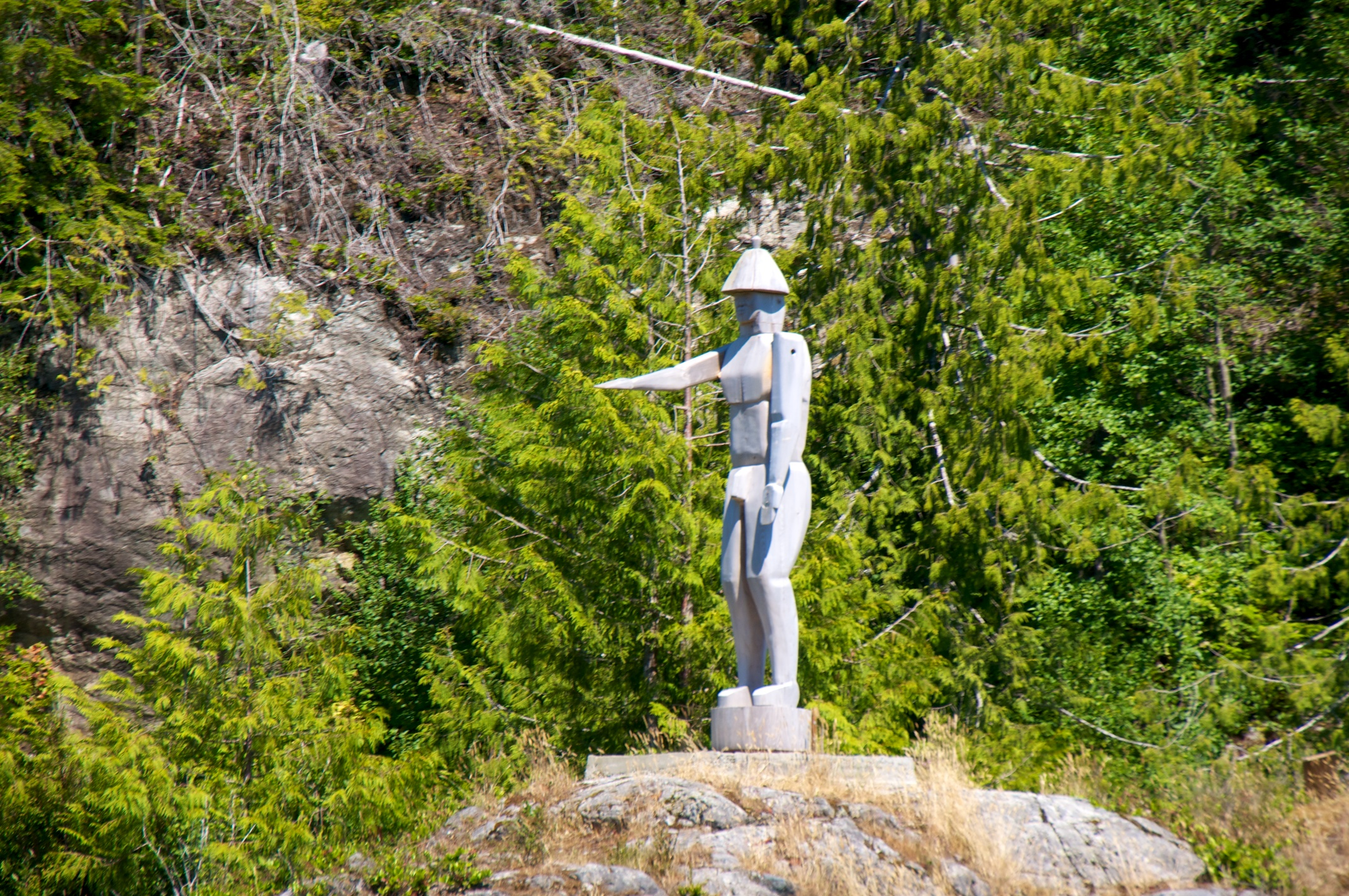 Ahousaht